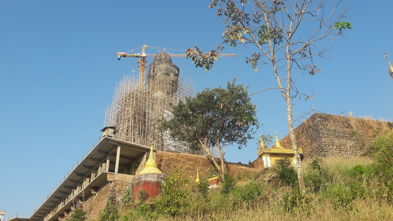 မြန်မာဘာသာ: ဘုရားကြီးဆောက်လုပ်